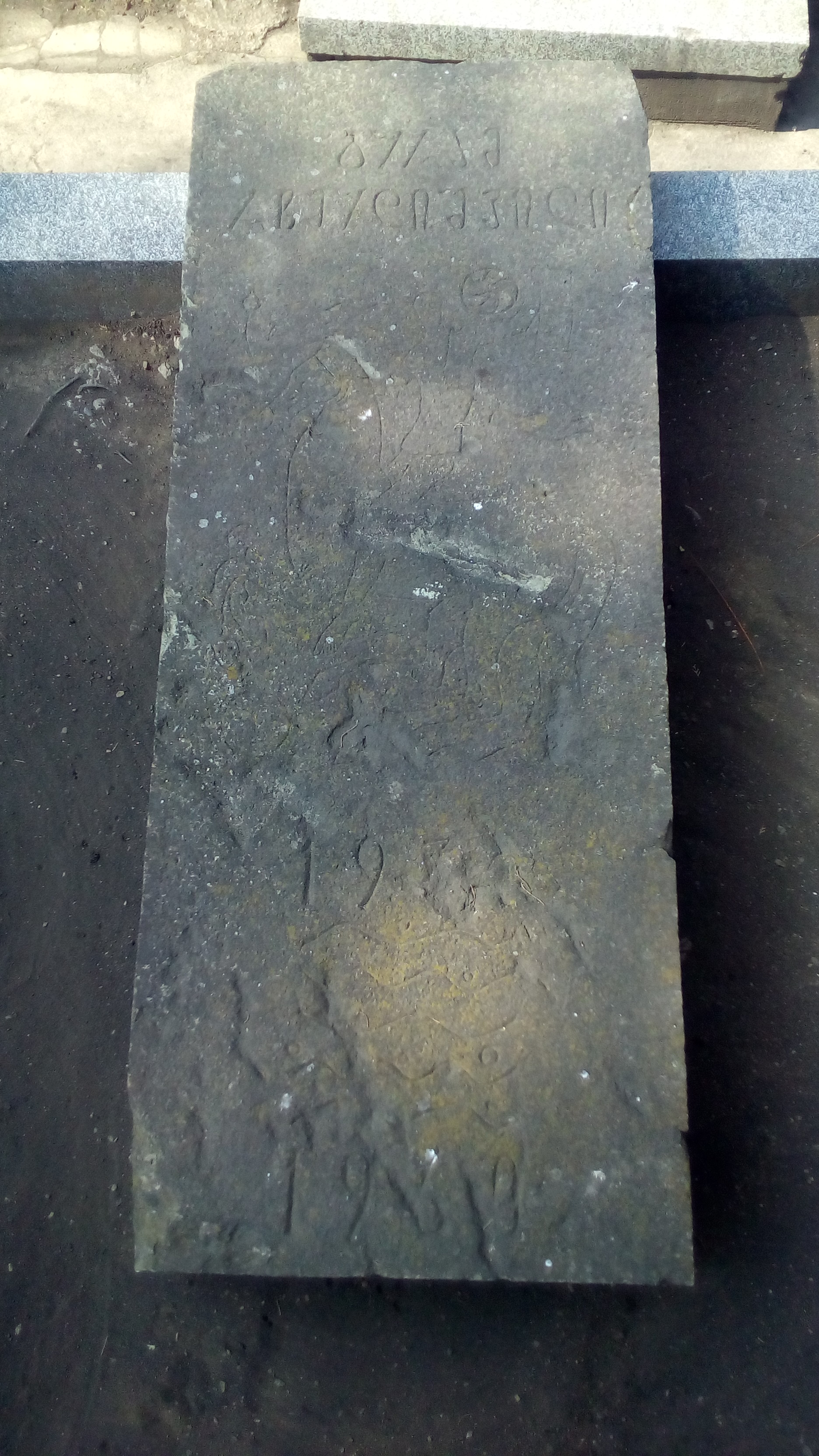 მწერალ გურამ რჩეულიშვილის საფლავი